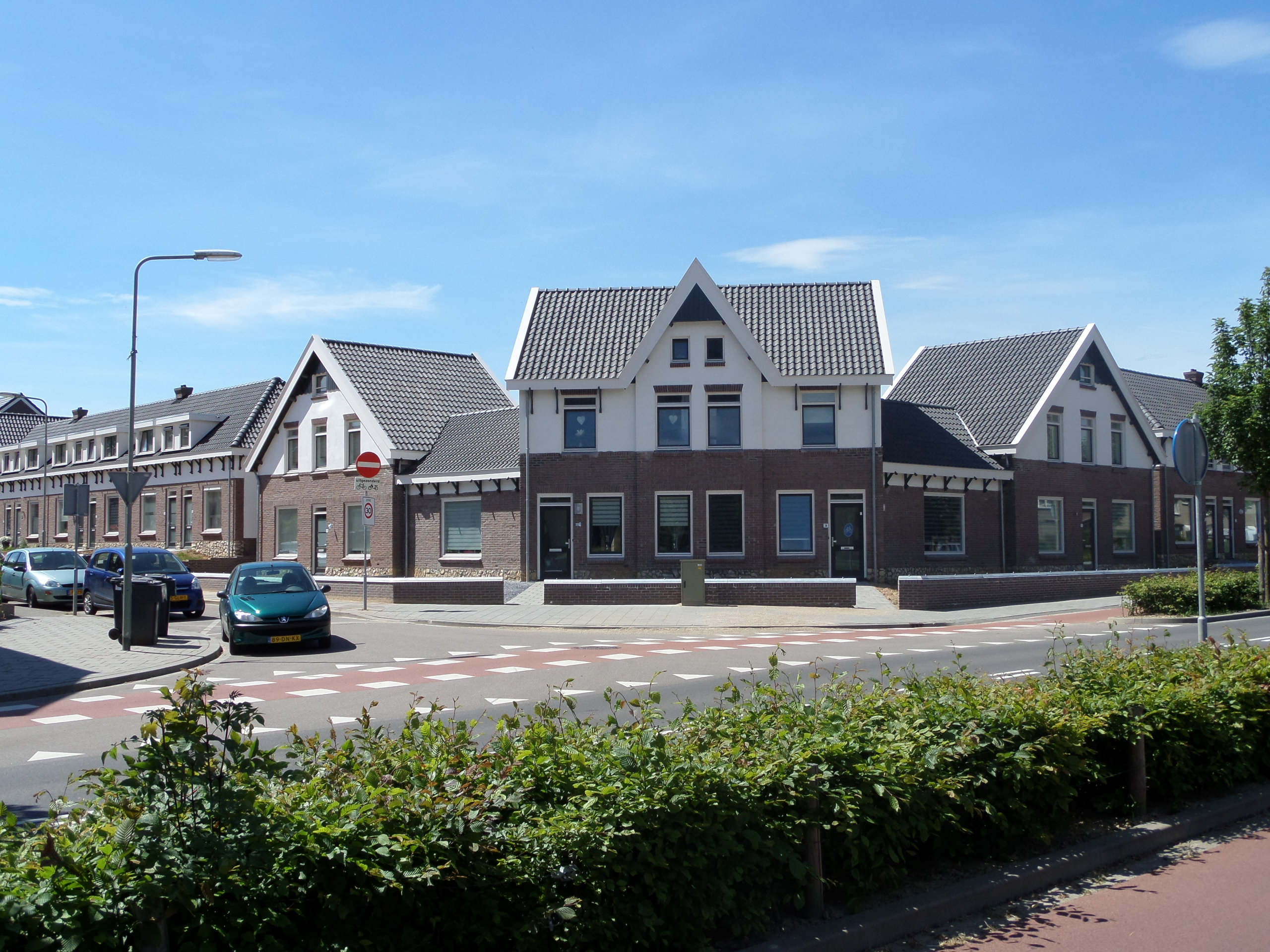 De Spoorkolonie in de Sittardse wijk Limbrichterveld